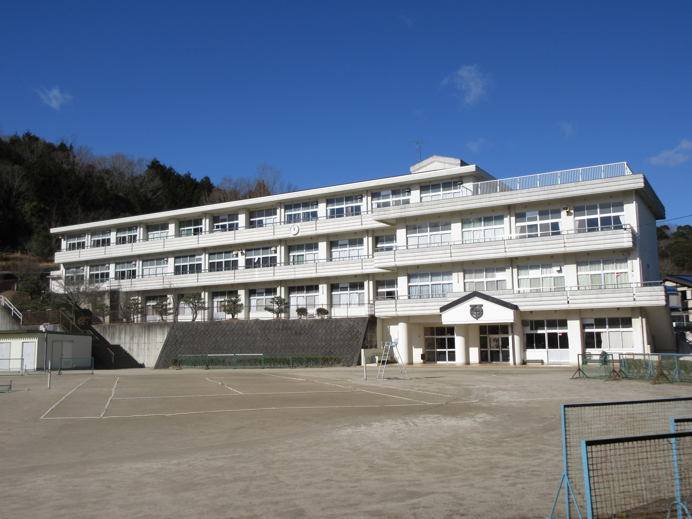 岡崎市立河合中学校（岡崎市茅原沢町）